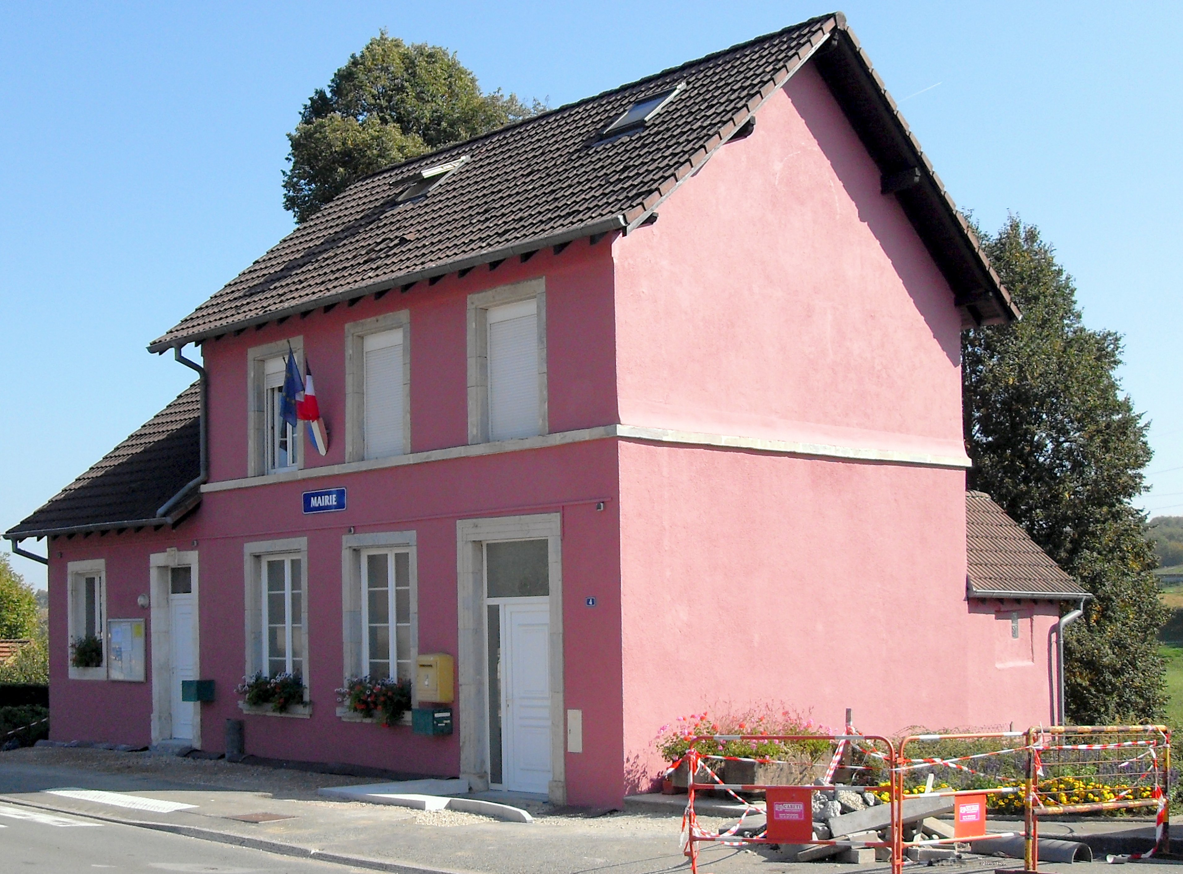 La mairie de Moval